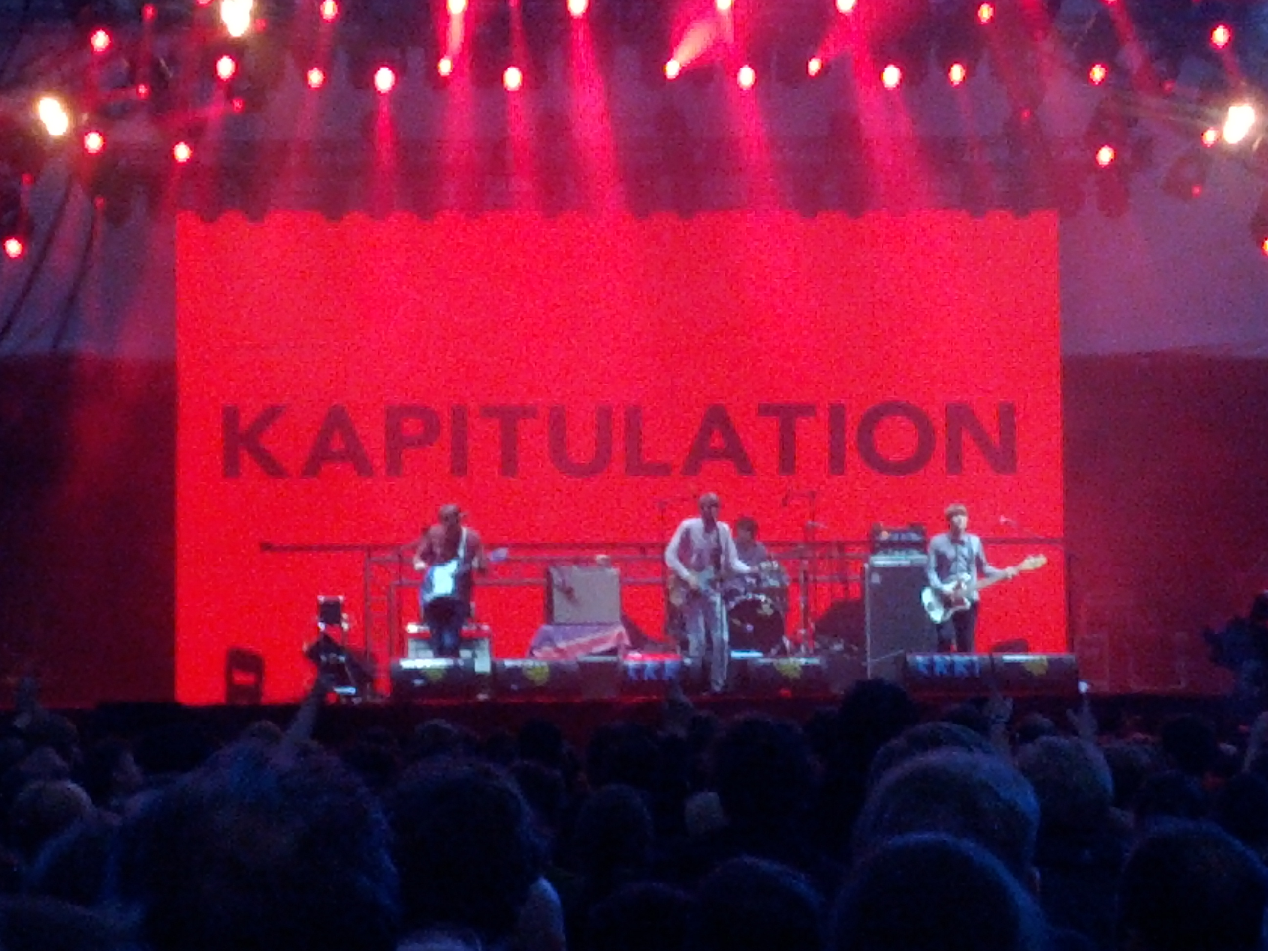 Tocotronic beim Berlin Festival 2012